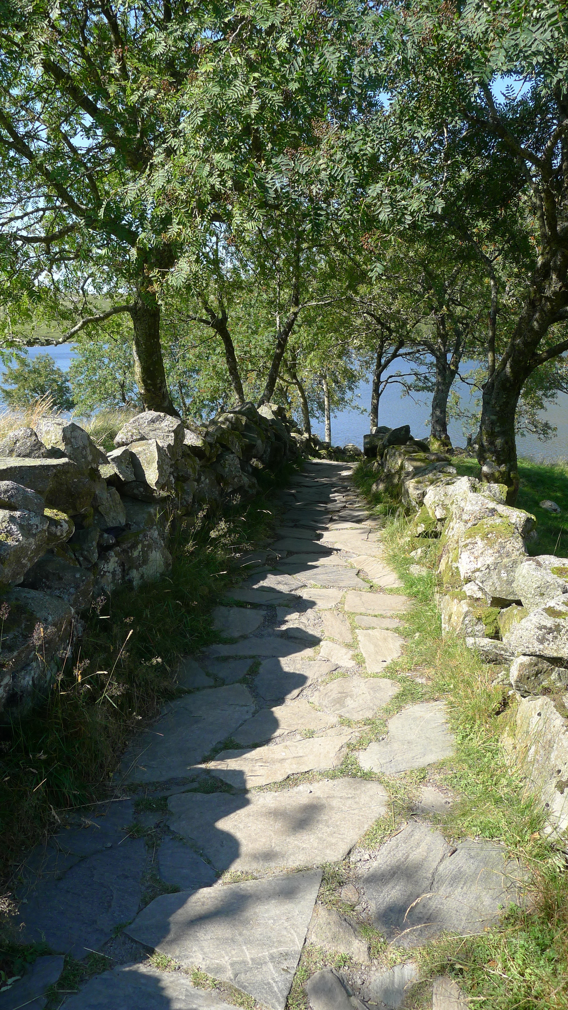 Geil ved Revholstjørn ved Dalsnuten i Sandnes.